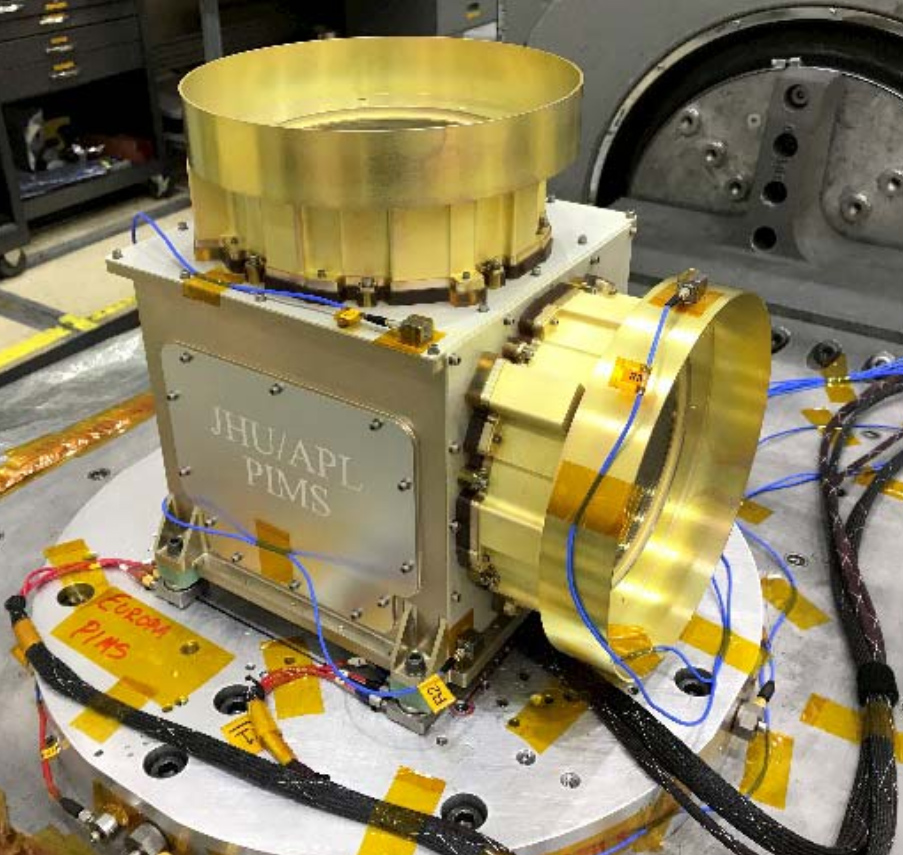 Europa Clipper Science Instrument : Plasma Instrument for Magnetic Sounding (PIMS)